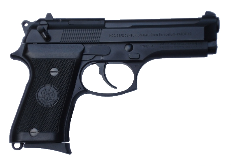 Beretta-92FS Compact Type M (Правая сторона)